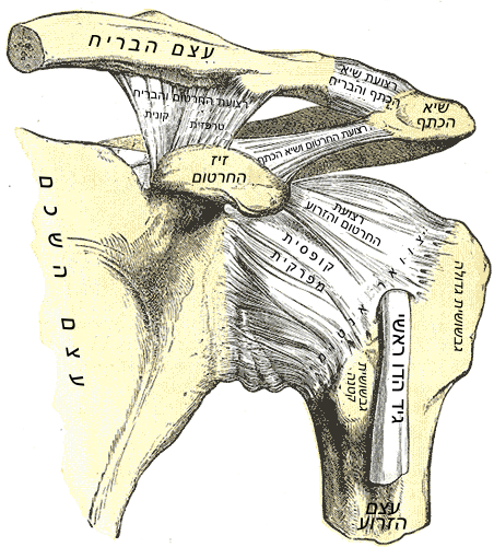 מפרקים ורצועות בכתף שמאל במבט קדמי